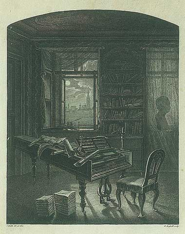 Beethovens Zimmer im Schwarzspanierhaus